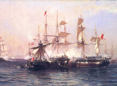 Batalla naval de Casma, 12 de enero de 1839.